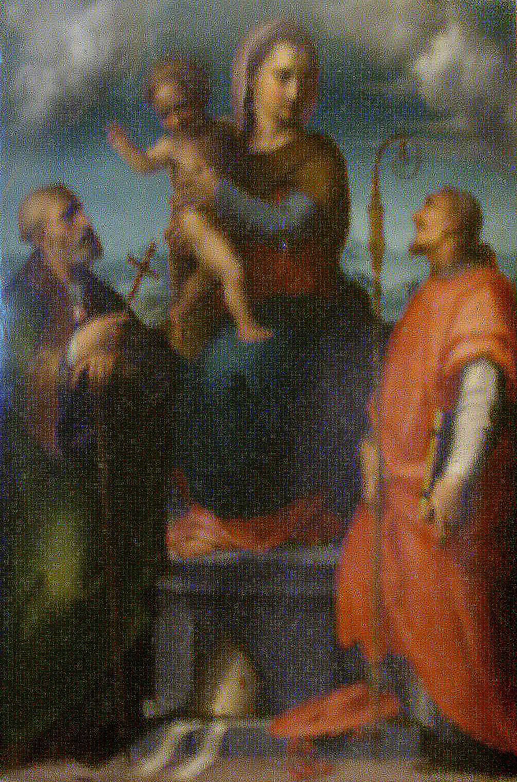 San Salvi museum, Maso da San Friano, Madonna col Bambino e i Santi Giovanni Gualberto e Bernardo degli Uberti. In Florence, Italy